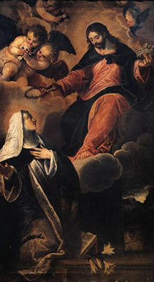 Maffeo da Verona, Cristo che incorona Santa Caterina da Siena Casa Secolare delle Zitelle - Udine